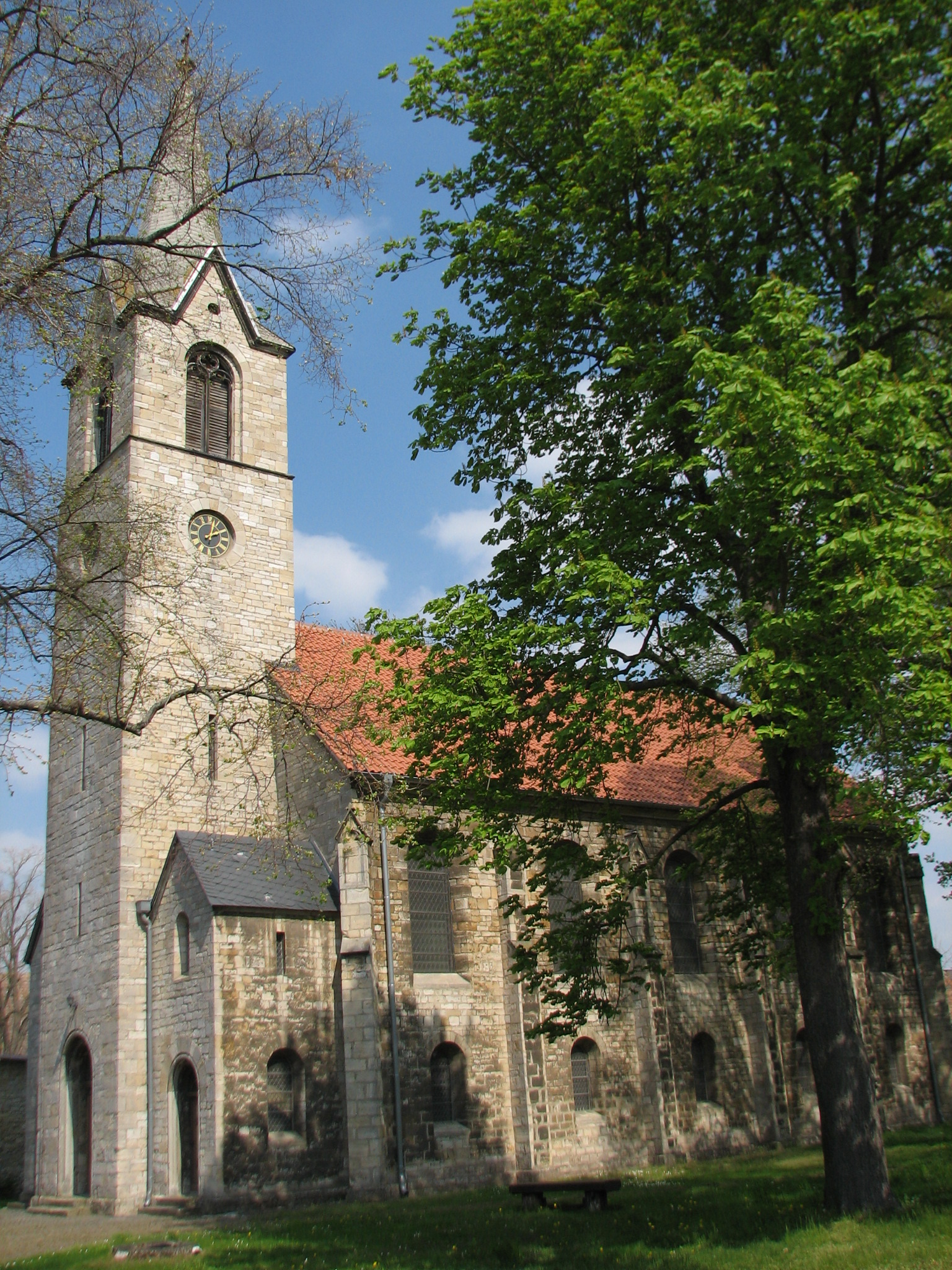 Evangelische Kirche zu Löderburg, Foto vom April 2019